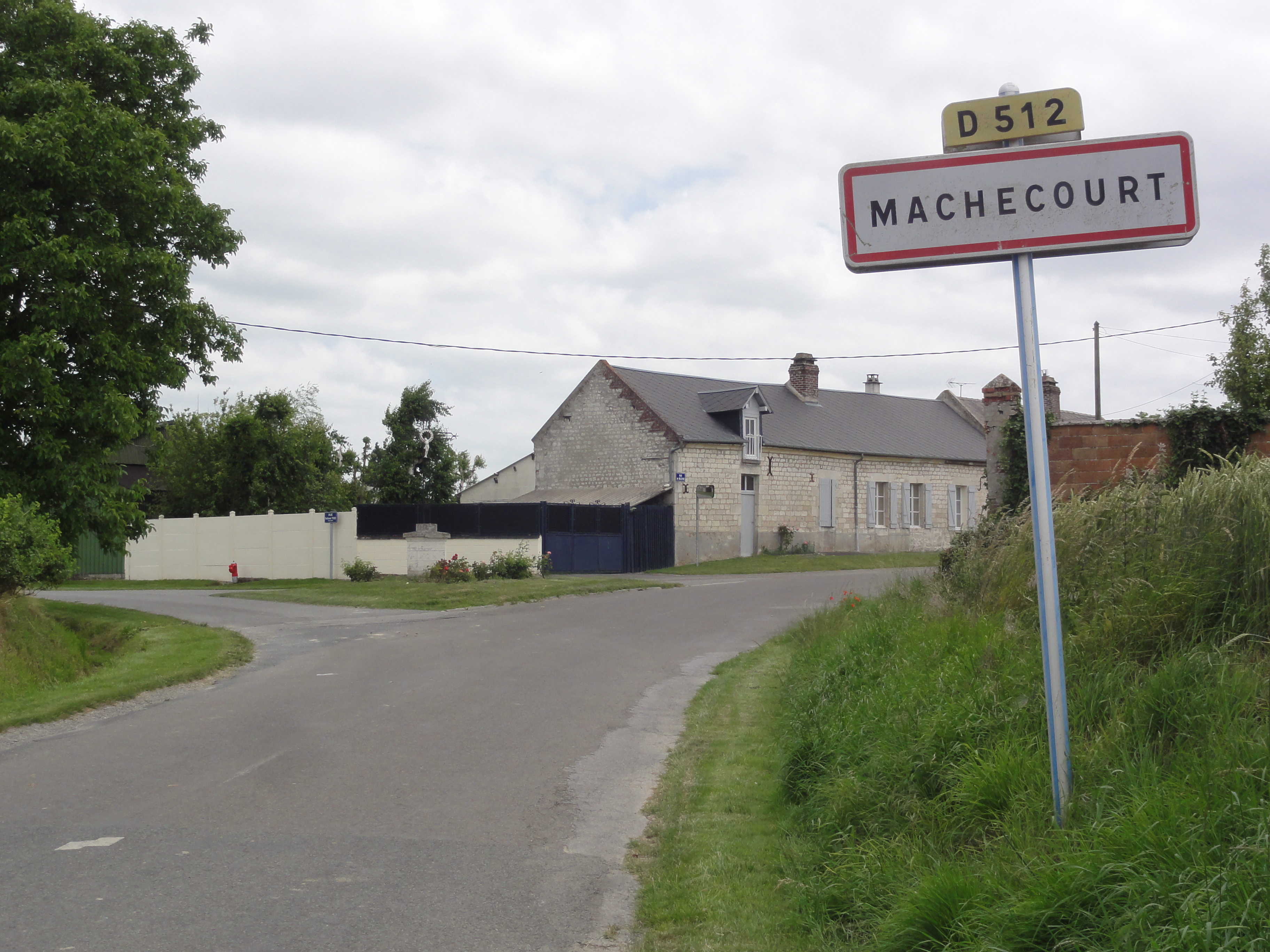 Mâchecourt (Aisne) city limit sign